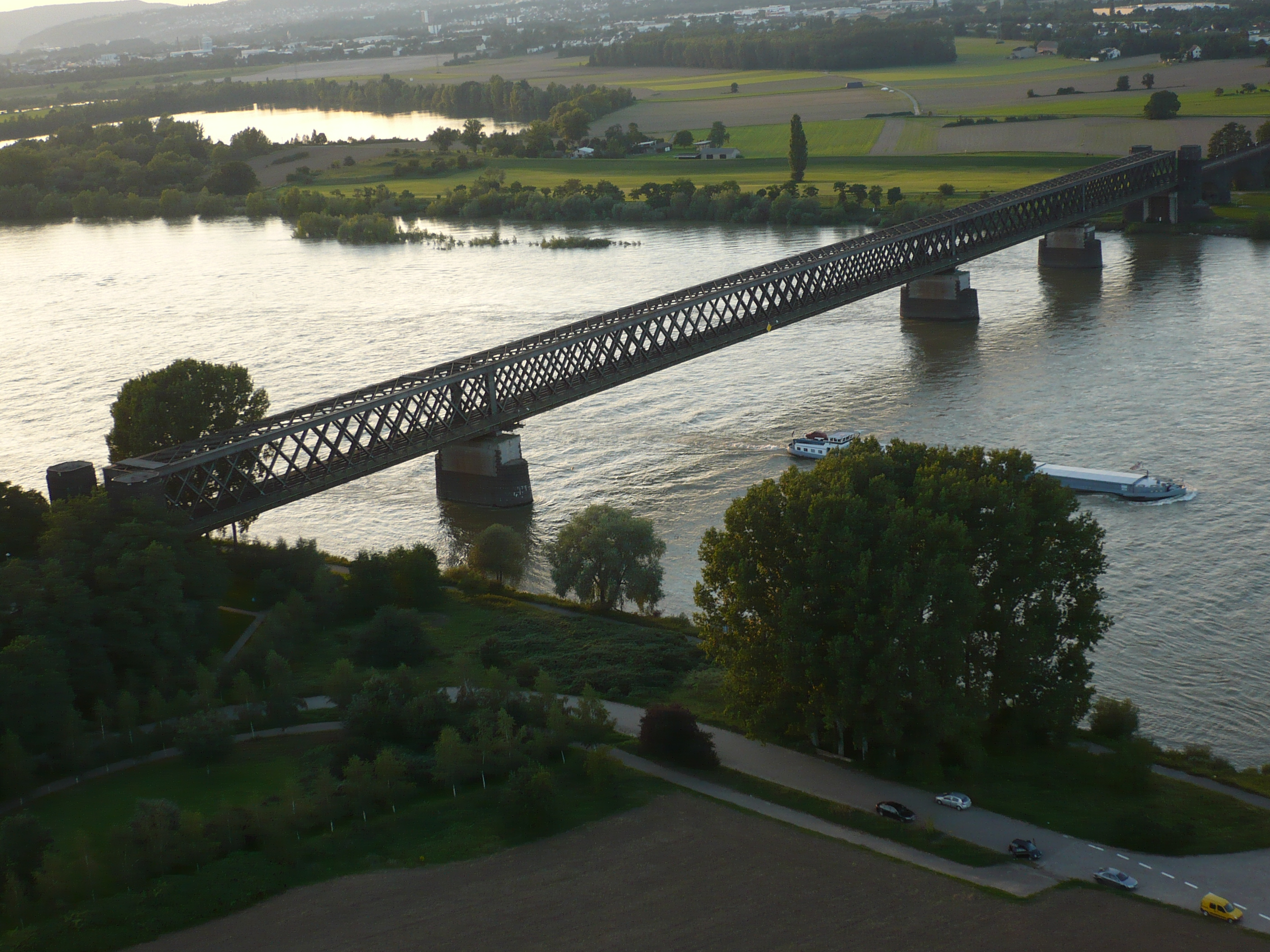 Luftaufnahme der Eisenbahnbrücke bei Urmitz über den Rhein, am gegenüberliegenden Rheinufer Teile des Naturschutzgebiets „Urmitzer Werth“